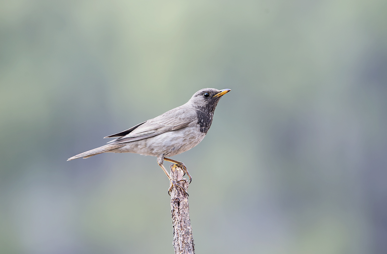 Sattal